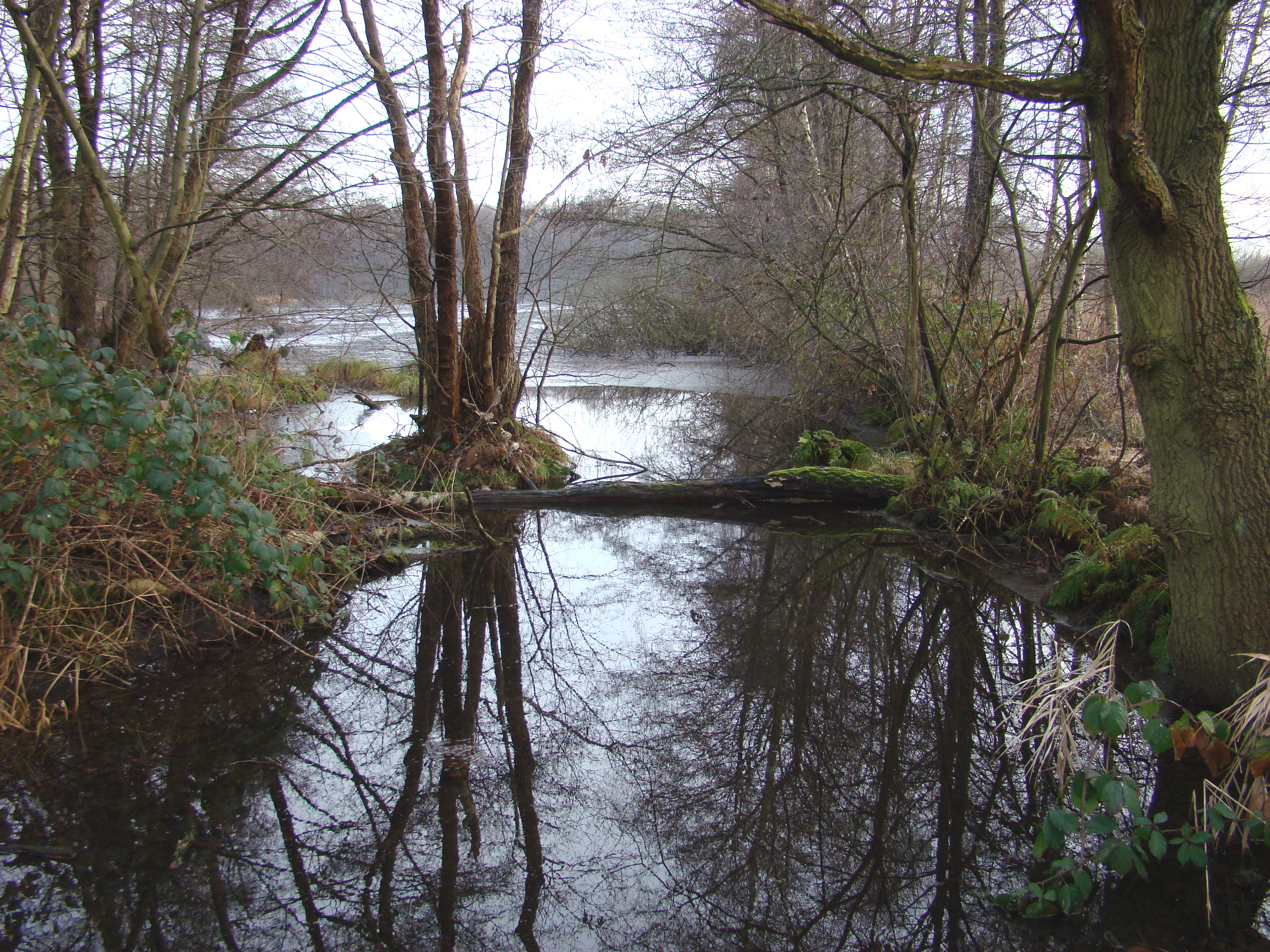 Teichfläche mit Erlen-Ufer Area of pond with alder-covered banks